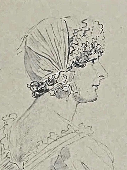 François Gérard (1770–1837): Die französische Schriftstellerin und Komponistin Alexandrine-Sophie de Bawr geborene de Champgrand (1773–1860). Bleistiftskizze, Ausschnitt.